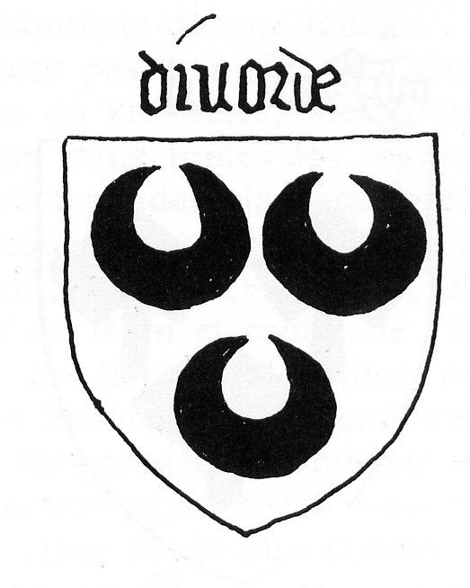 écu de la famille de Divorde (van Divorde, van Dievoert, van Duivenvoorde, Hollande et Brabant), vers 1440